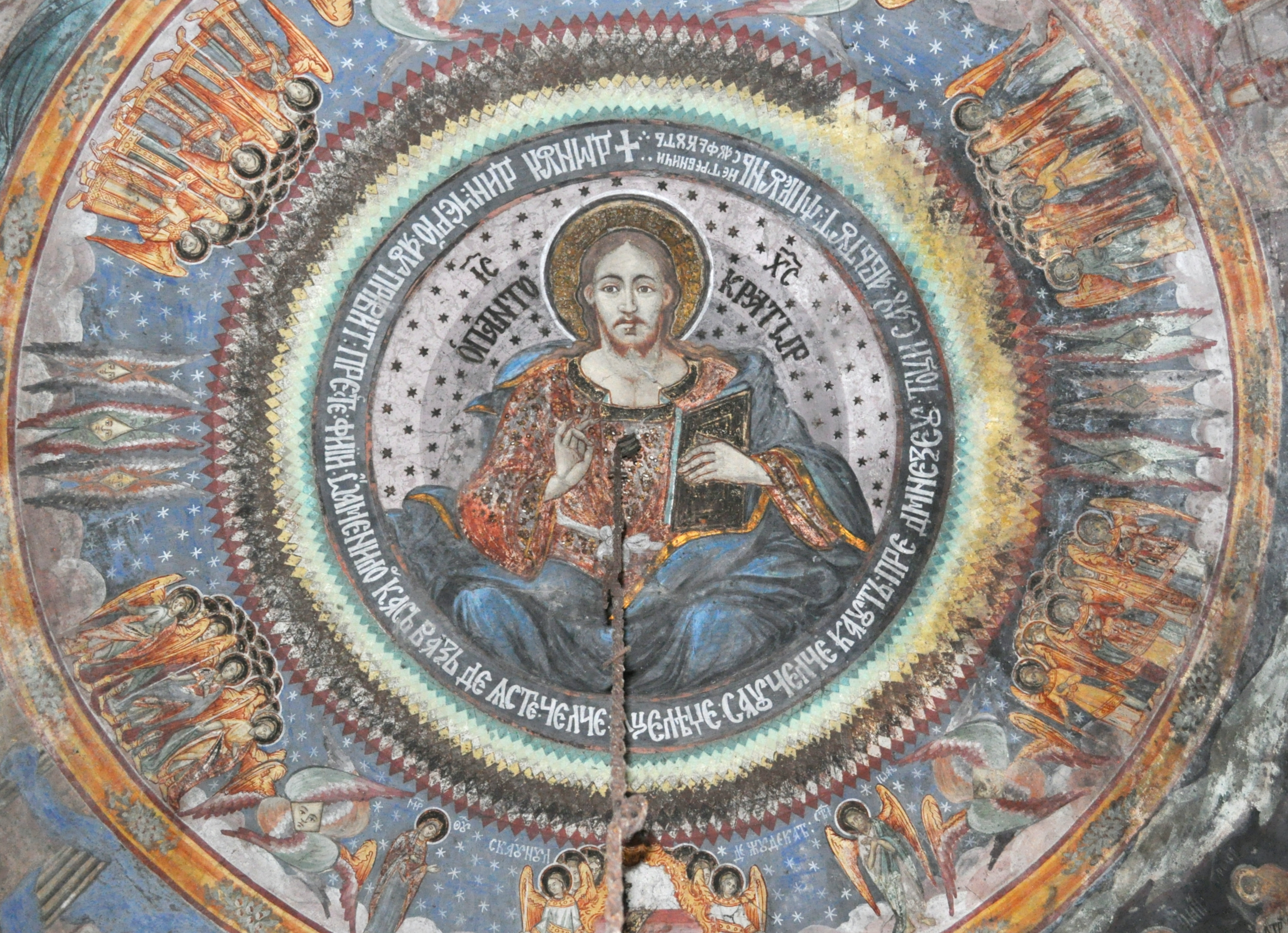 Biserica „Sf. Ioan, Sf. Nicolae și Sf. Gheorghe”, sat Cojani, oraș Târgu Cărbunești